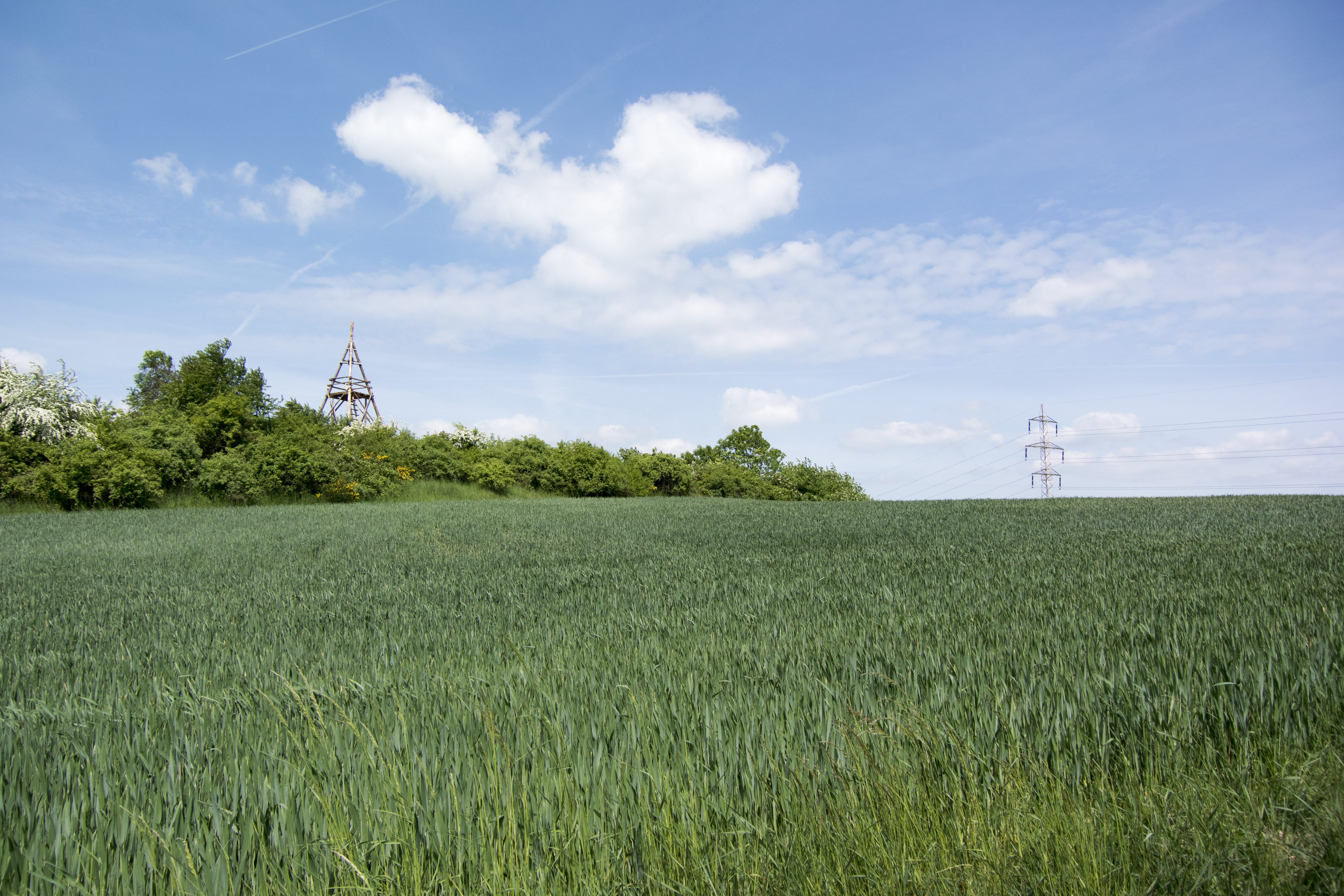 Ze dne 23.5.2015